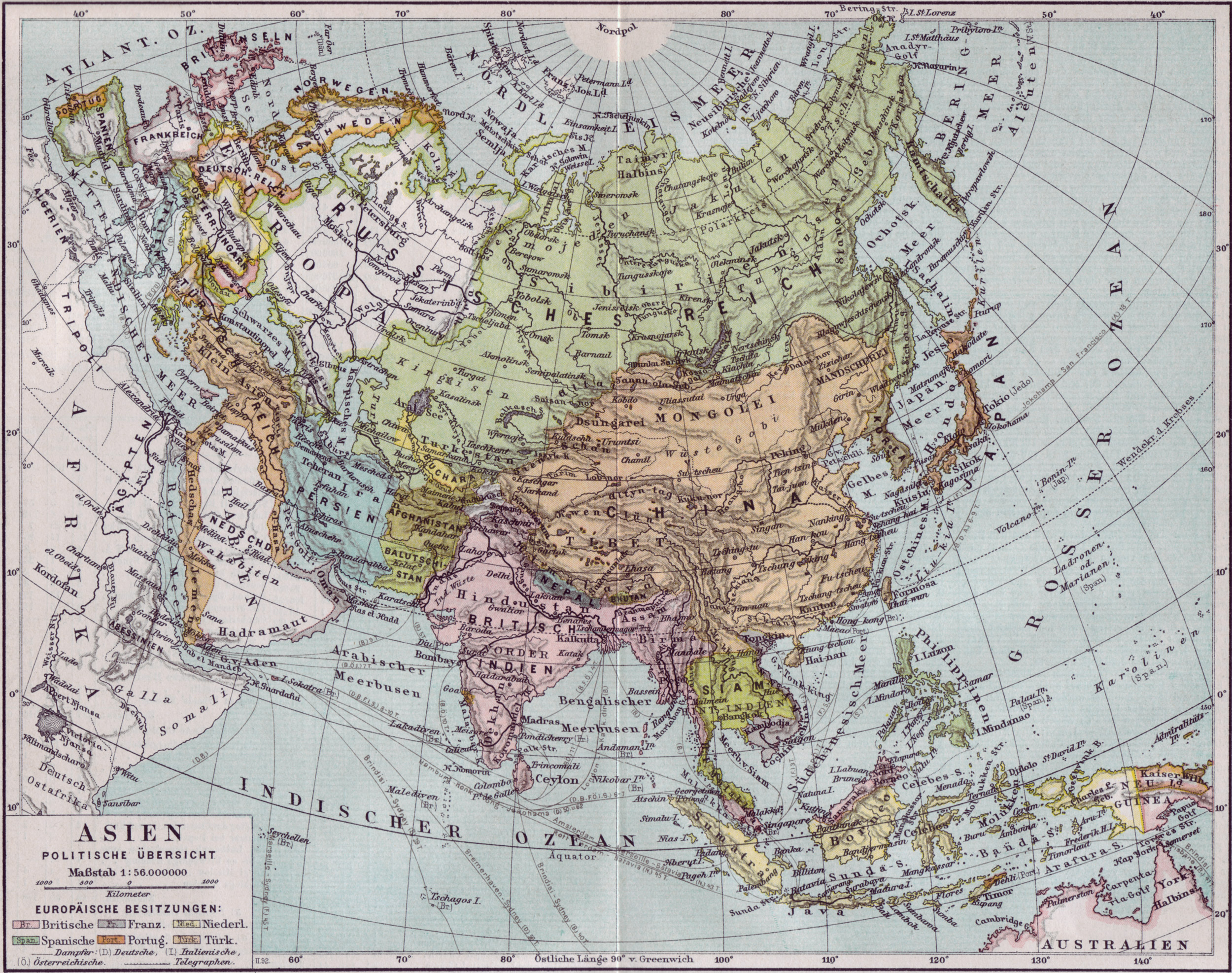 Karte von Asien - politische Übersicht ca. 1890